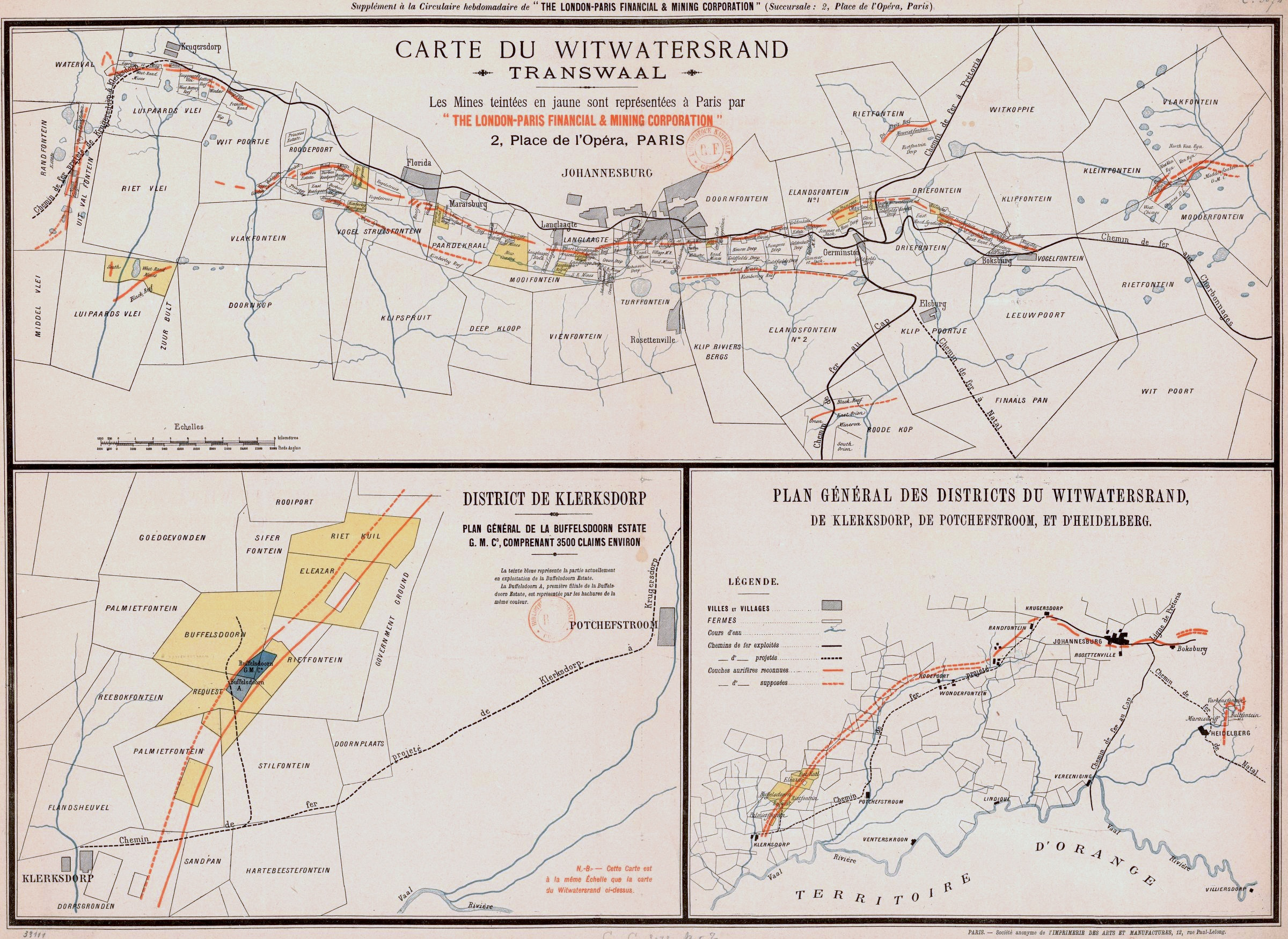 Carte du Witwatersrand, Transvaal